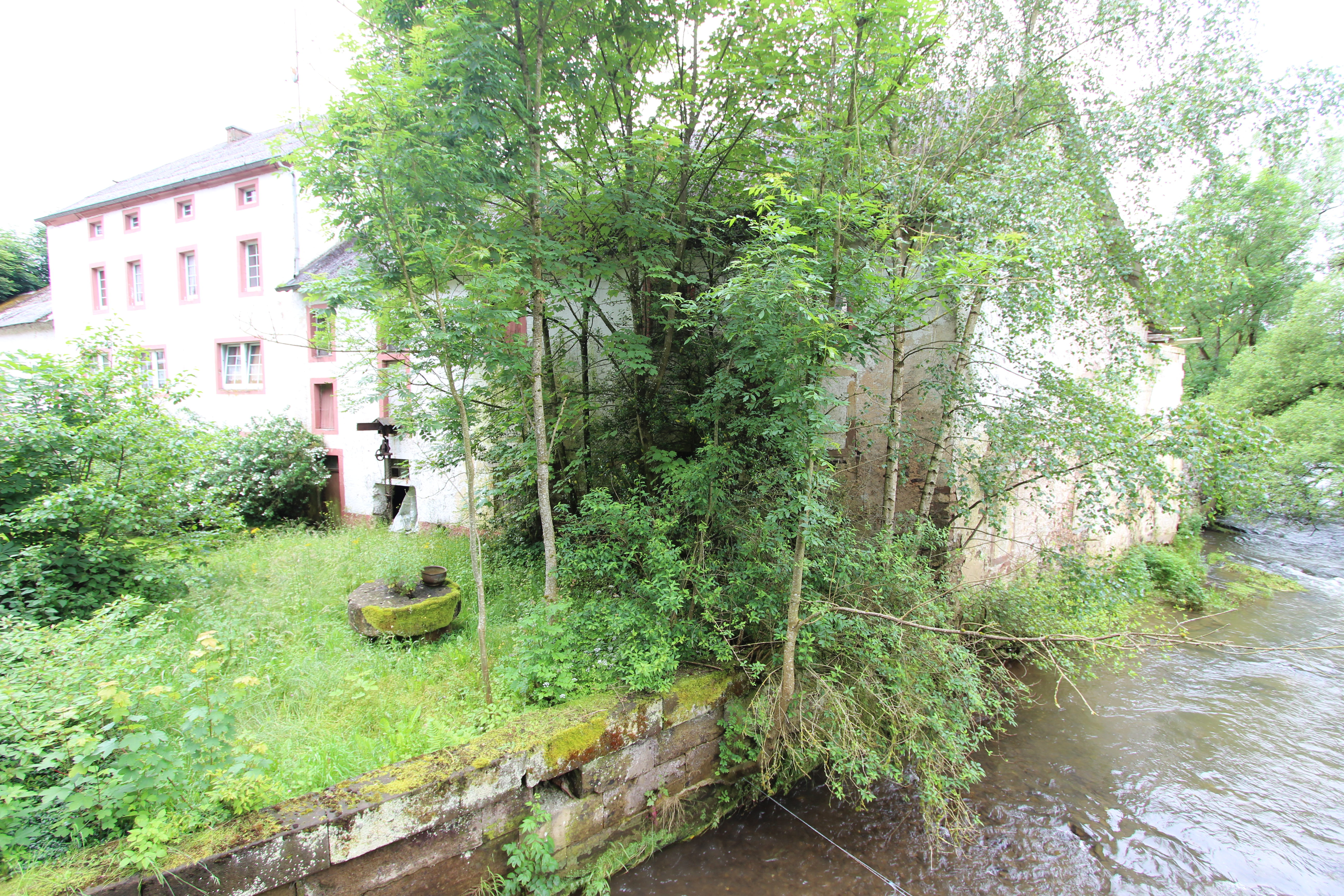 54675 Sinspelt, nördlich des Ortes. Ehemalige Mühle / Sägegatter in der Neuerburger Straße 1, deren Hauptgebäude im Jahr 1865 einen schon in der Tranchot-Karte verzeichneten Vorgänger ersetzte. Aufnahme von 2016.